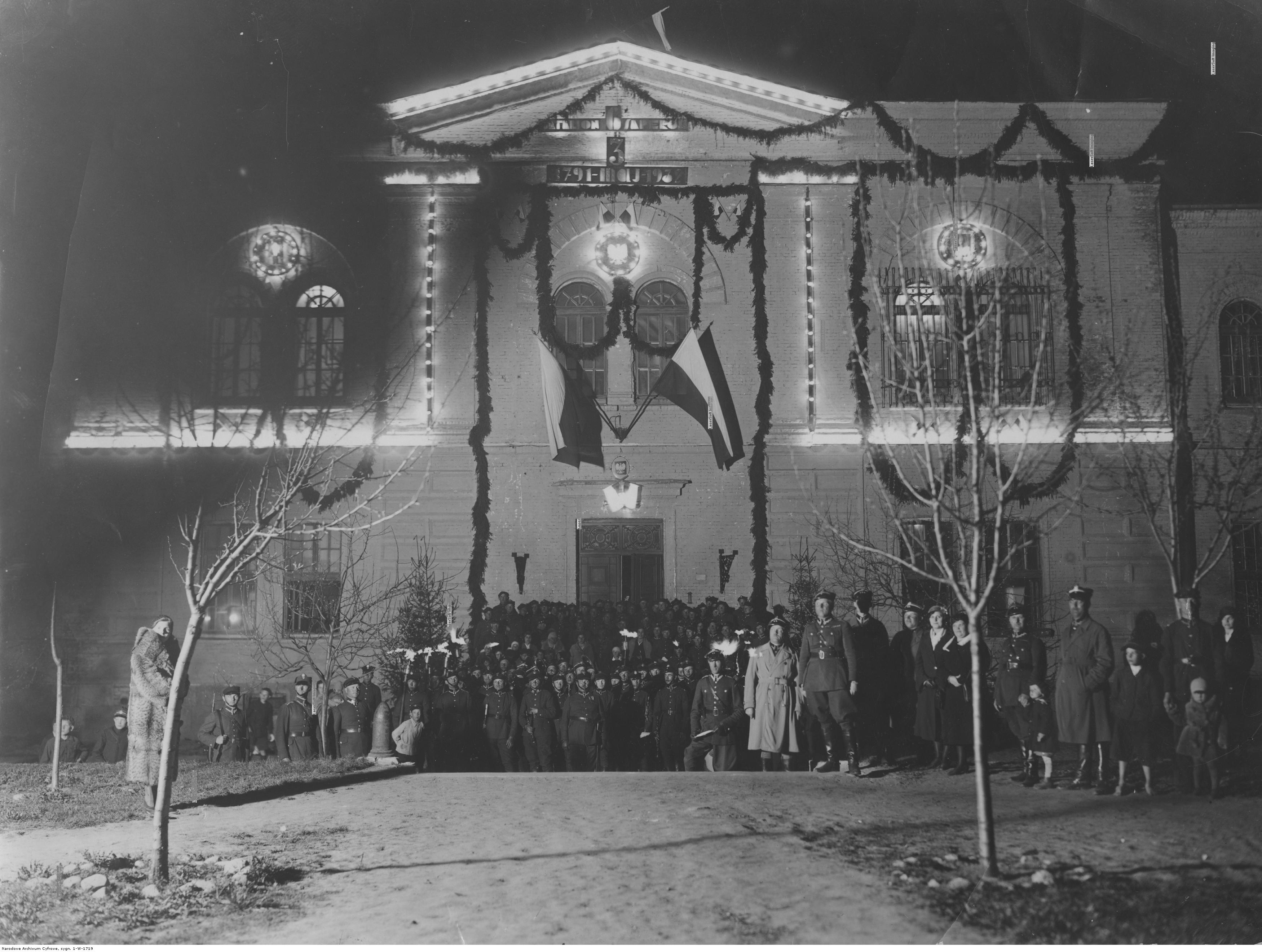 Koszary 6 Batalionu Saperów w Brześciu nad Bugiem. Widok ogólny budynku koszar przystrojonego z okazji święta 3 Maja. Koncern Ilustrowany Kurier Codzienny - Archiwum Ilustracji. Sygnatura: 1-W-1719